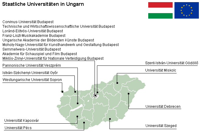 Ungarnkarte mit Lokalisierung aller staatlichen Universitäten (Liste der Universitäten und Hochschulen in Ungarn)